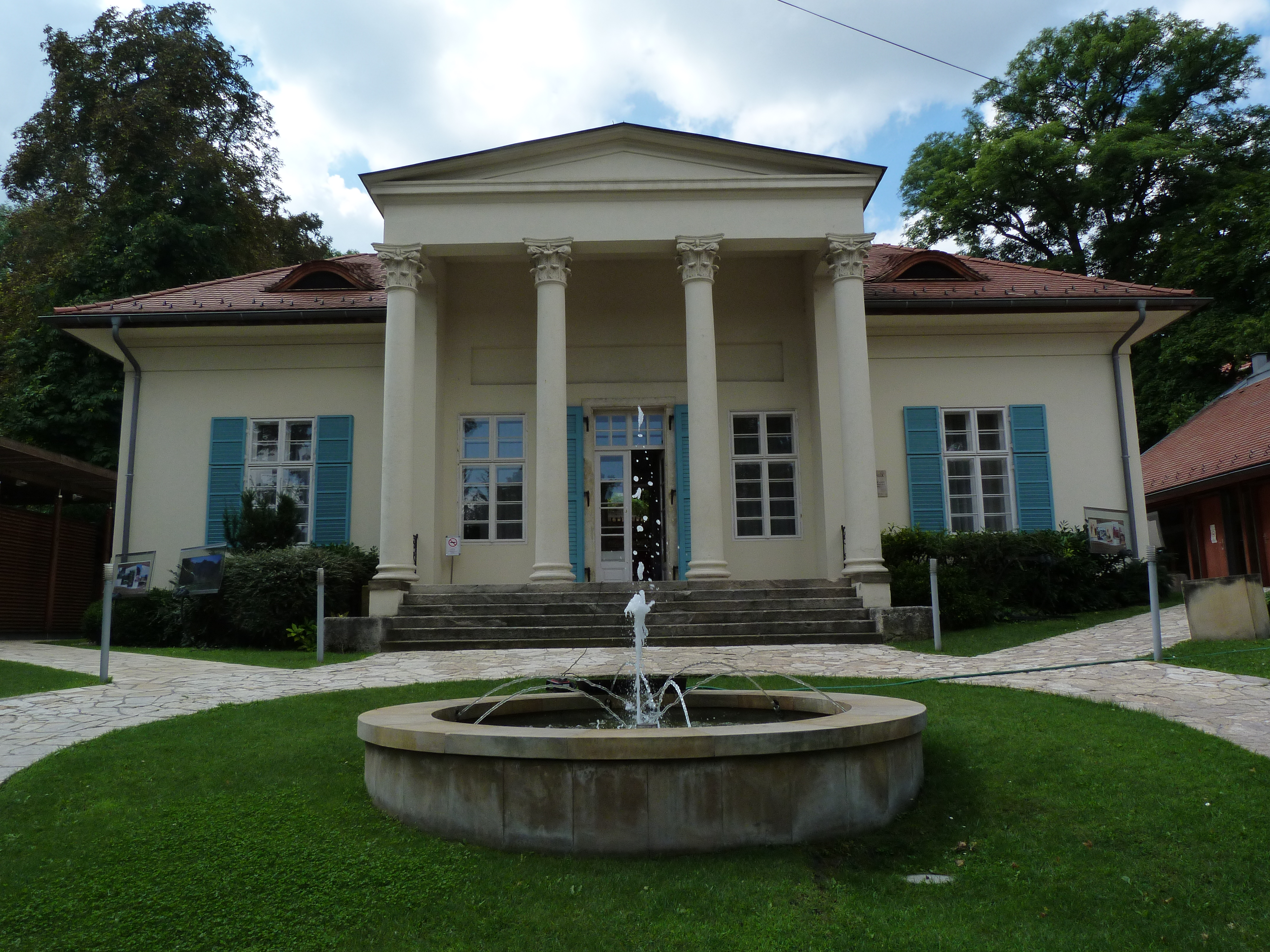 A felvétel 2014. augusztus 15-én pénteken készült Budapesten. Barabás Miklós (1810-1898) udvarháza. A mai Városmajor utca 44 szám alatti telket, melyen szőlő volt, présház és egy pince Barabás Miklós festőművész vásárolta meg 1839-ben. Az épület 1840-ben épült Barabás tervei alapján. Eleinte nyári lakként használta. Többször vendégeskedett itt Liszt Ferenc, Bajza József és József nádor is. Felújította Budapest Hegyvidék Önkormányzata 2000-2003 között, Basa Péter építész tervei alapján. Források: Udvarház tájékoztató ©© Derzsi Elekes Andor, Budapest 2014, You are authorised to use these photos and vids under Creative Commons – even for commercial, for profit purposes. Photos must be attributed to Derzsi Elekes Andor. All of the photos and vids in the Metapolisz DVD line are under Creative Commons and can be used even for commercial – for profit – purposes. Recommended Citation Derzsi Elekes Andor: Metapolisz DVD line